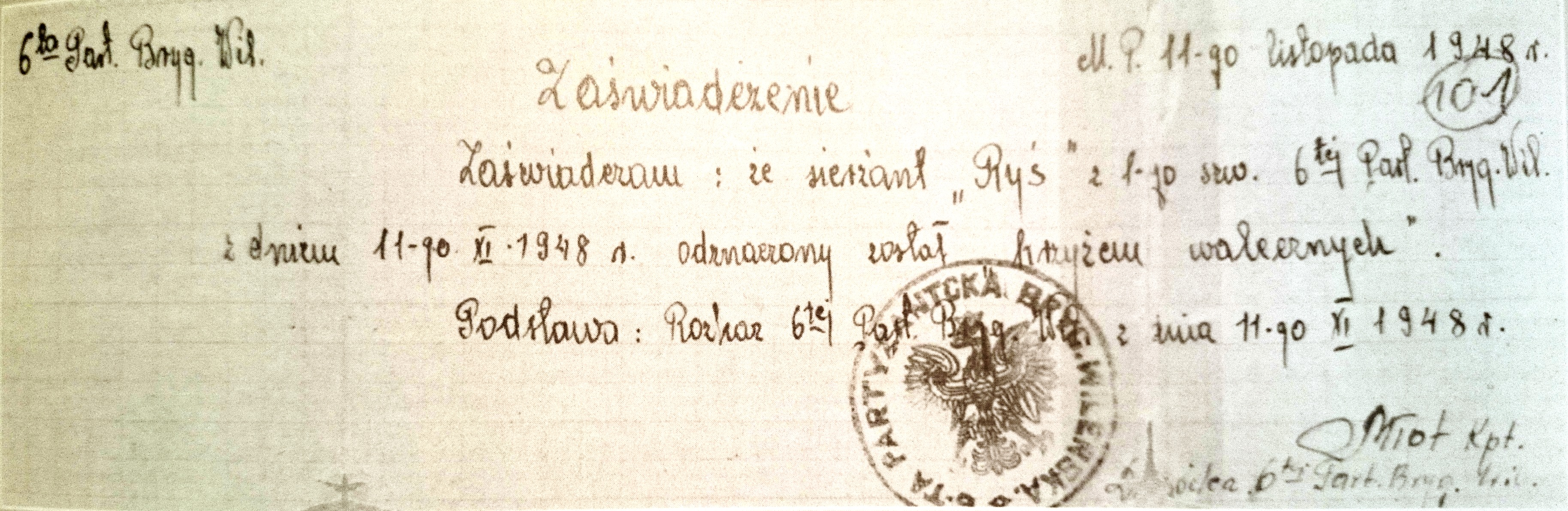 Ząświadczenie o odznaczeniu sierżanta Eugeniusza Tymińskiego Krzyżem Walecznych, wystawione 11 listopada 1948 roku przez Młota